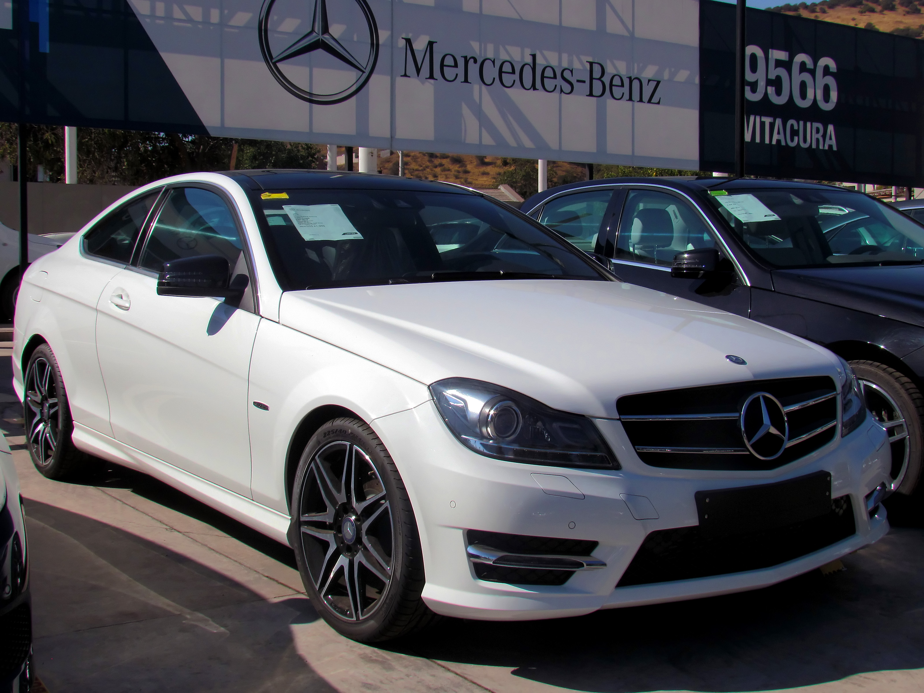 Mercedes Benz C 250 Coupe 2014